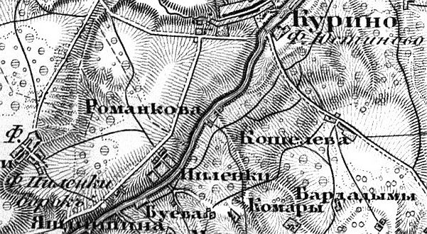 фольварок, маєток, село Піленки Вітебского повіту Вітебської губернії, фрагмент карти Шуберта Ф. Ф. 1846 року